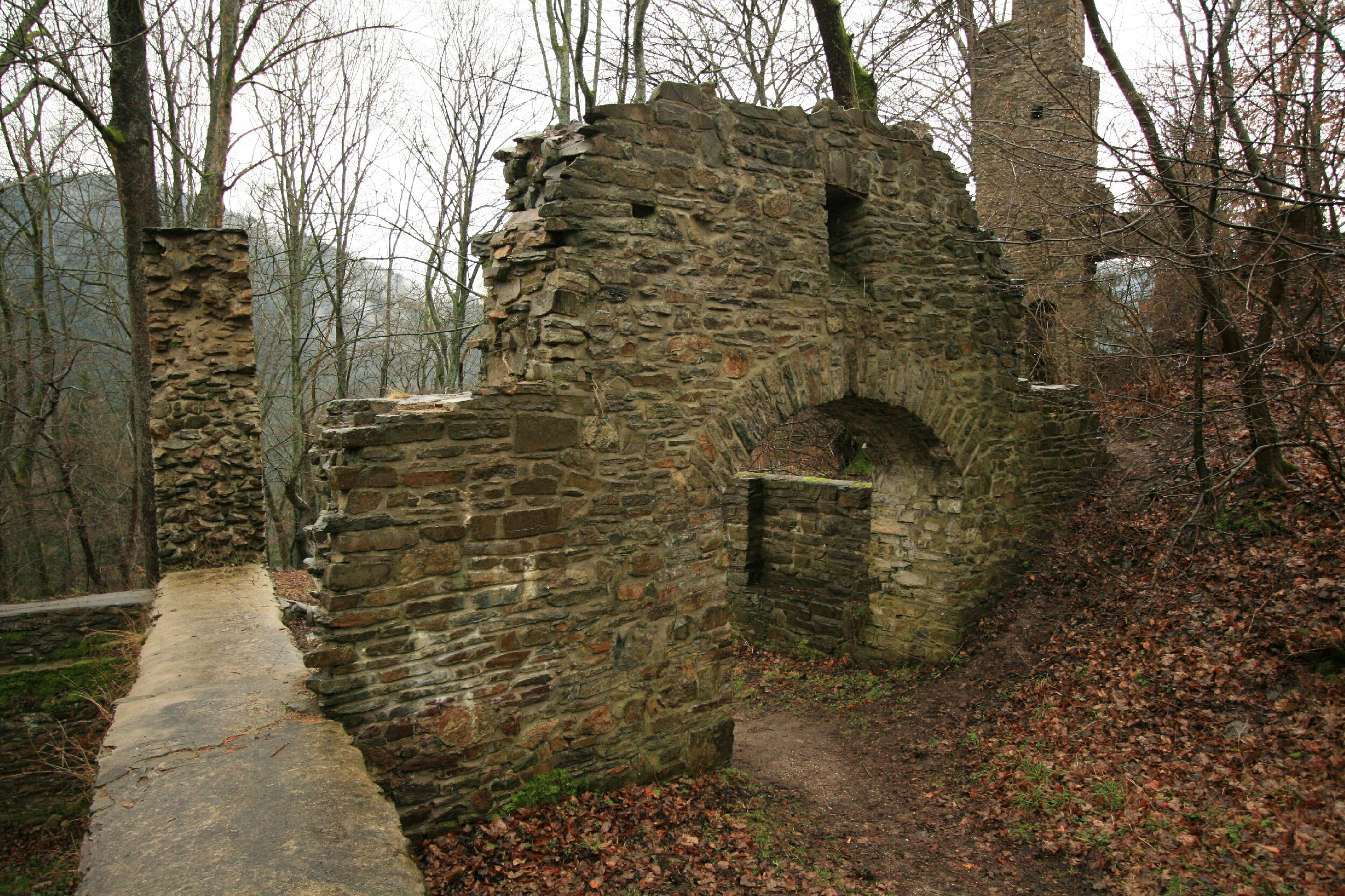 Burg Schwarzenberg Blick nach W, Pfort von der Innenseite